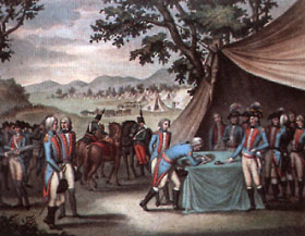 Traité de La Jaunaye. Pacification de la Vendée. Estampe.